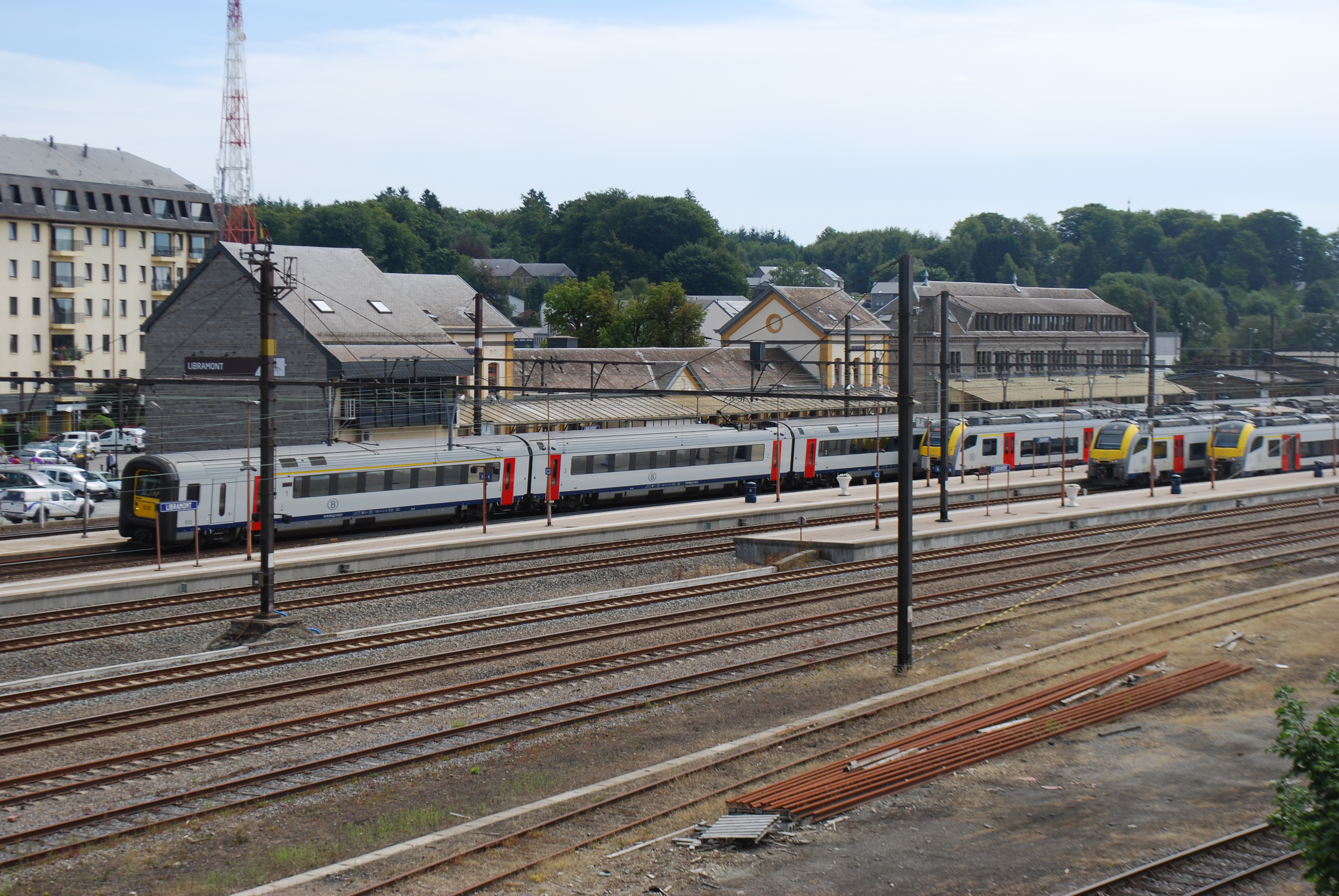 Vue de Libramont.